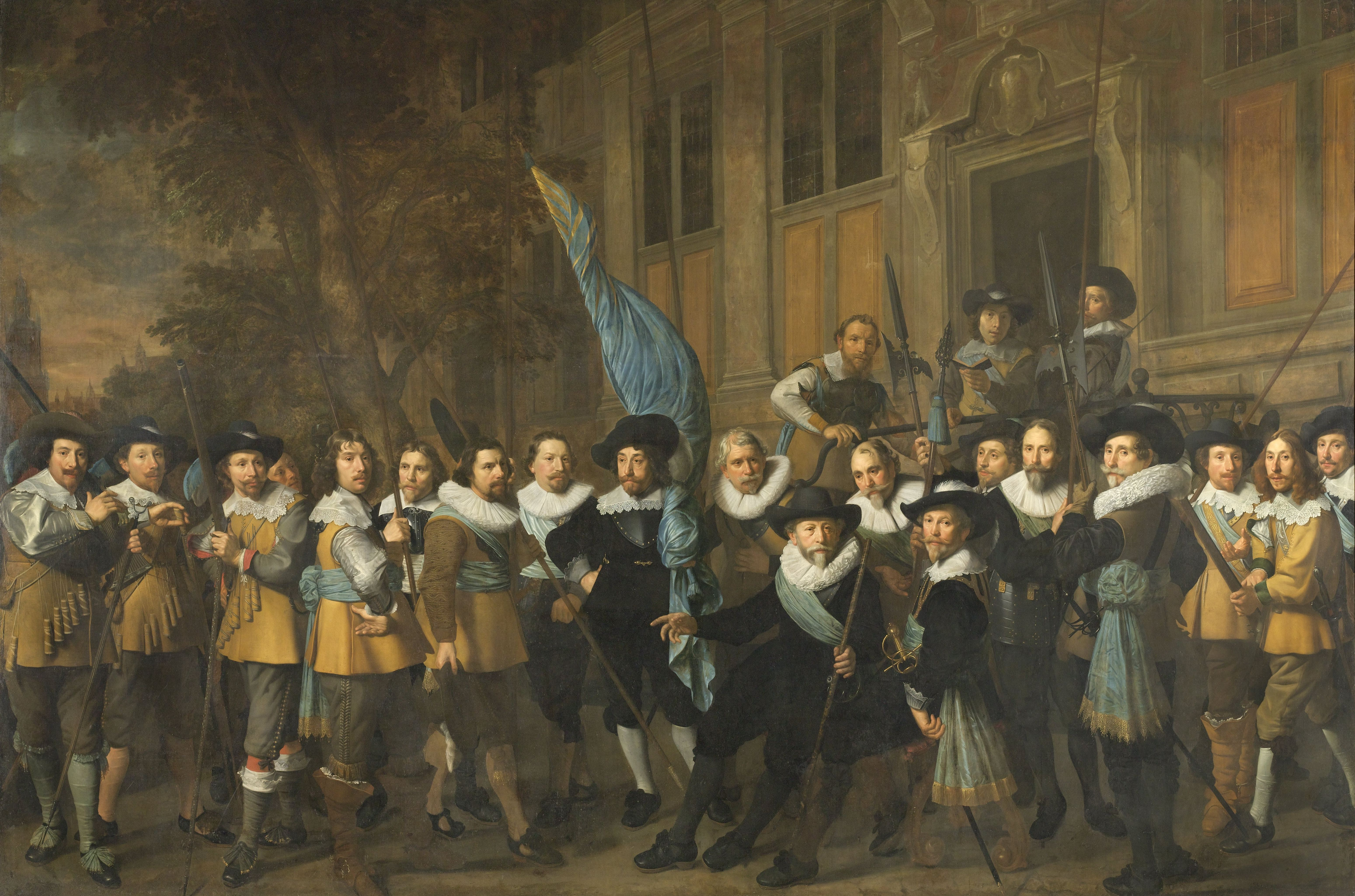 Schuttersstuk van het korporaalschap van kapitein Jan Claesz Vlooswijck en luitenant Gerrit Hudde, van de Kloveniersdoelen te Amsterdam, 1642. De kapitein en de luitenant zijn gezeten, om hen heen staan de schutters, in het midden de vaandrig. Vermoedelijk bevinden zij zich voor de brouwerij 'De Zwaan'. De schutters zijn: Jan Witsen, Hillebrant Bentes, Andries Dircksen van Saane, Jan Bentes, Willem Simonsz Moons, Jan Huybertsen Codde, Roelof Roelofsen de Lange, IJsbrant van de Wouwer, Johannes Looten, Ulrich Petersen, Jacob Bleyenberch, Pieter Harpertsen, Pieter Tonneman, Evert Huibertsen Krieck, Hendrik Jansen van As en Nicolaes Kuysten. De schutters zijn bewapend met pieken, hellebaarden, lansen en geweren.